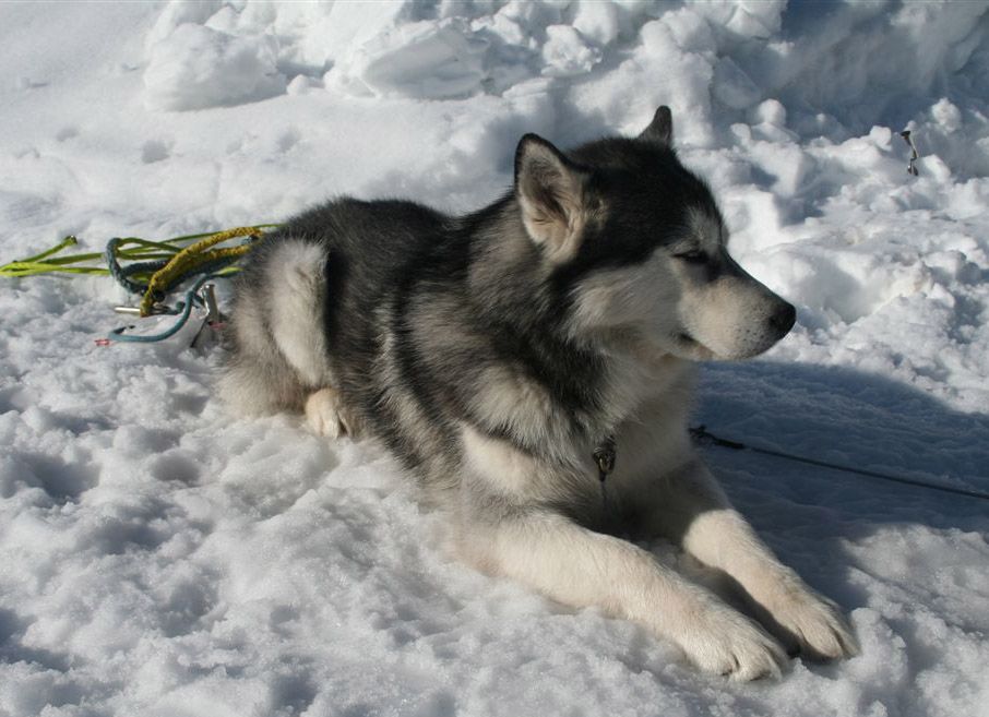 An Alaskan Malamute